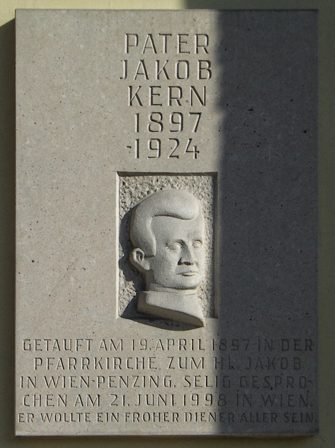 Jakob Franz Alexander Kern, 1897 - 1924, Wien, Penzing, Penzinger Pfarrkirche